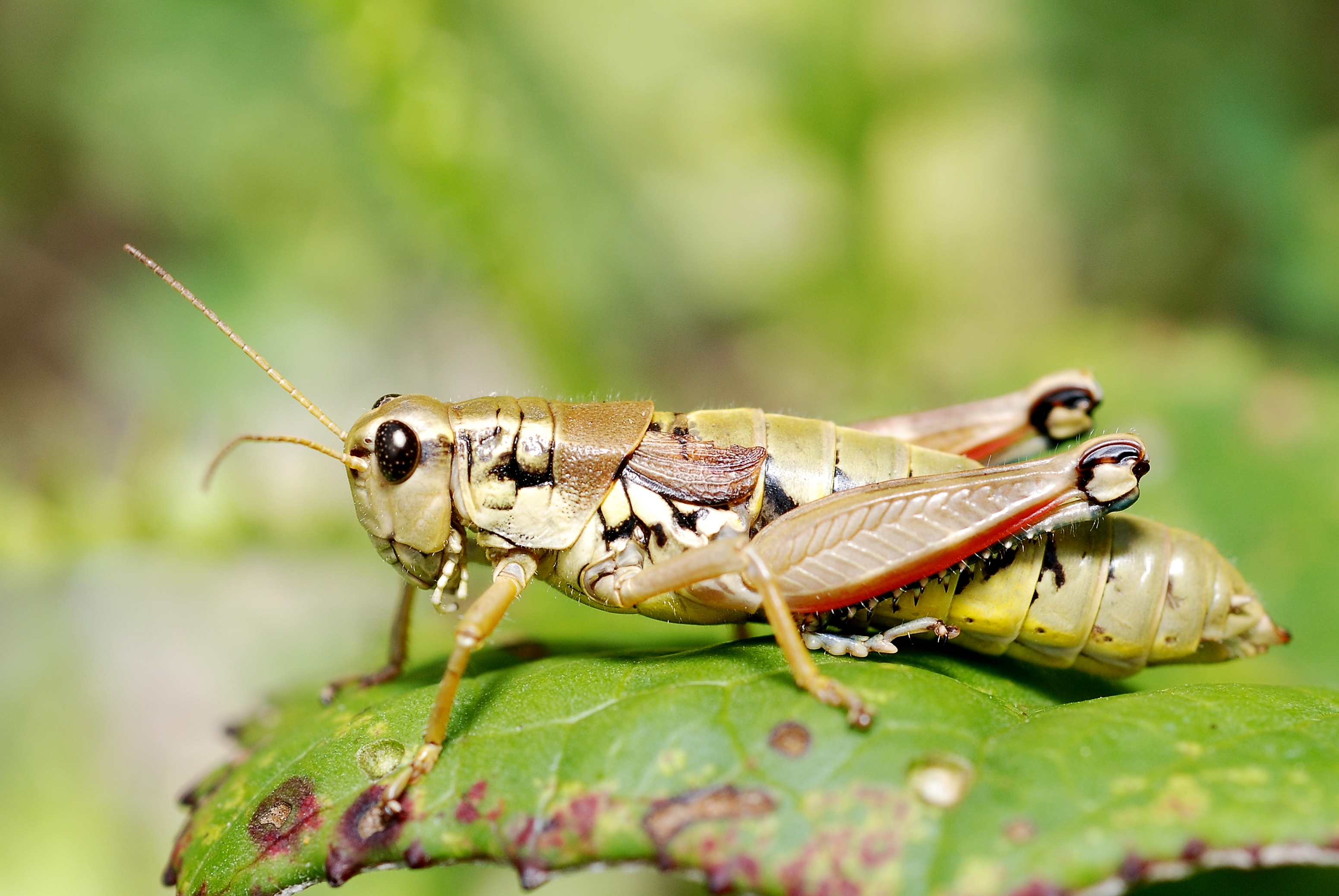 Podisma pedestris female